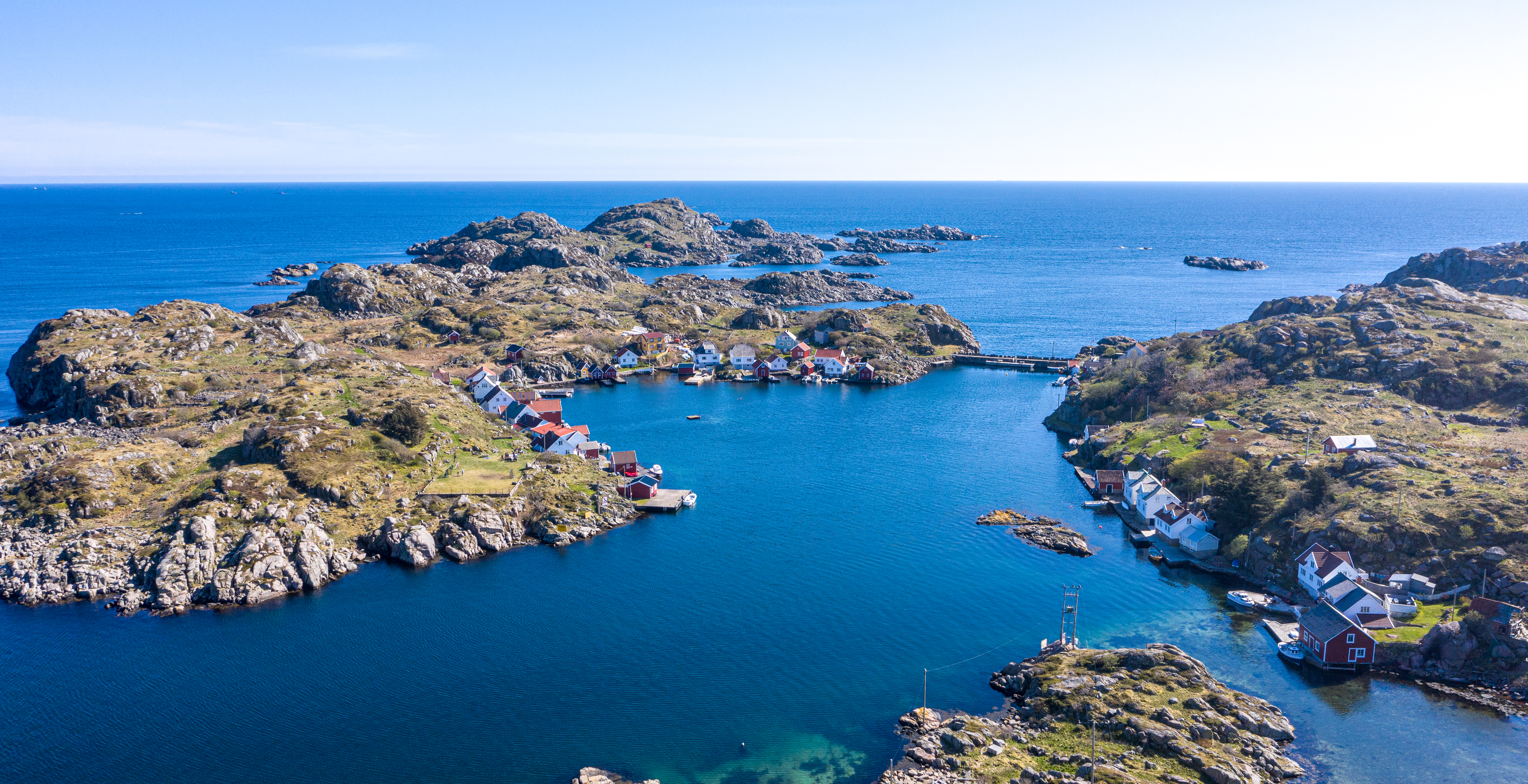 Sælør sett fra luften